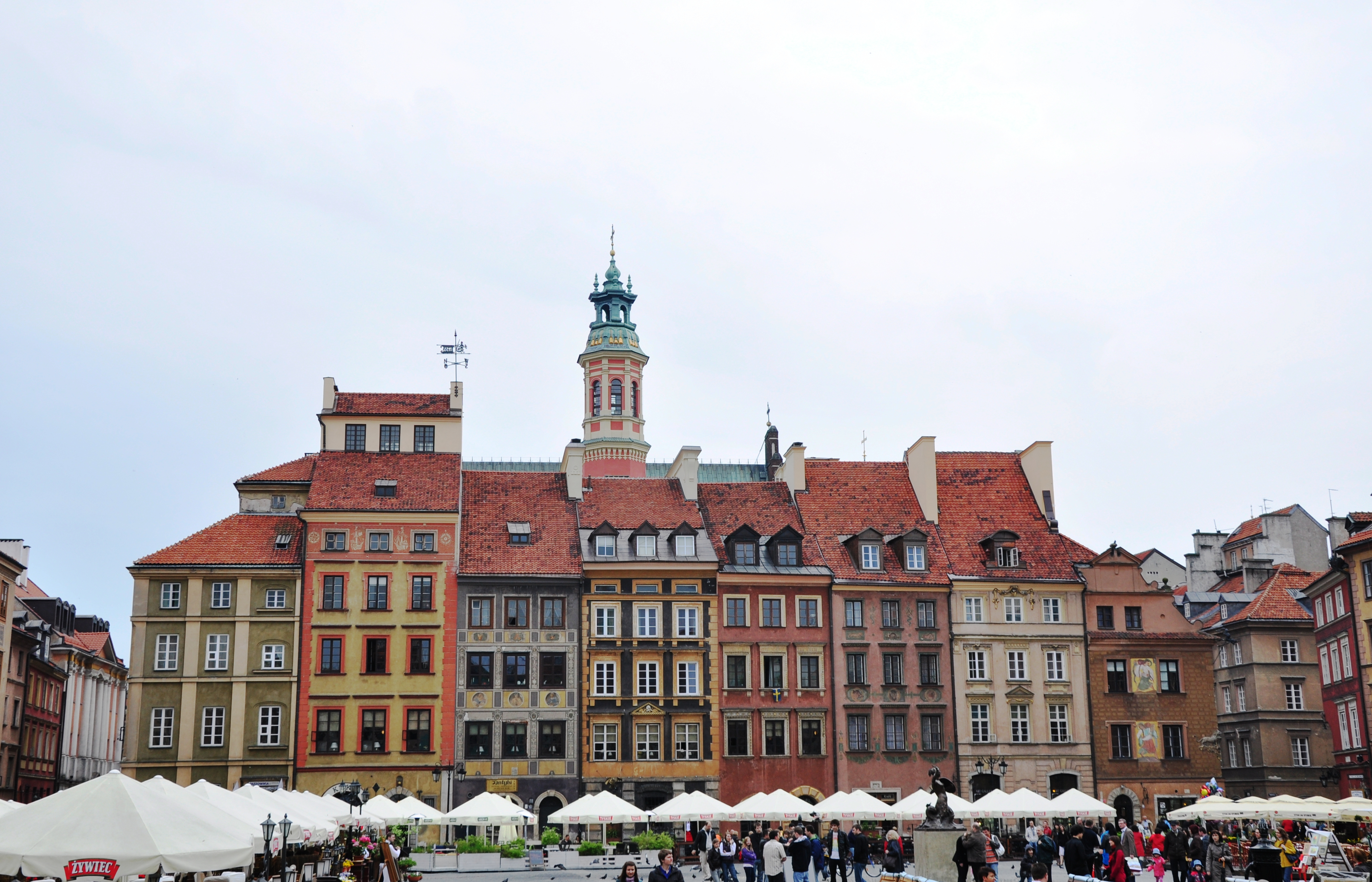 Warschau Altstadt (Stary Rynek), Fassade Richtung Süden